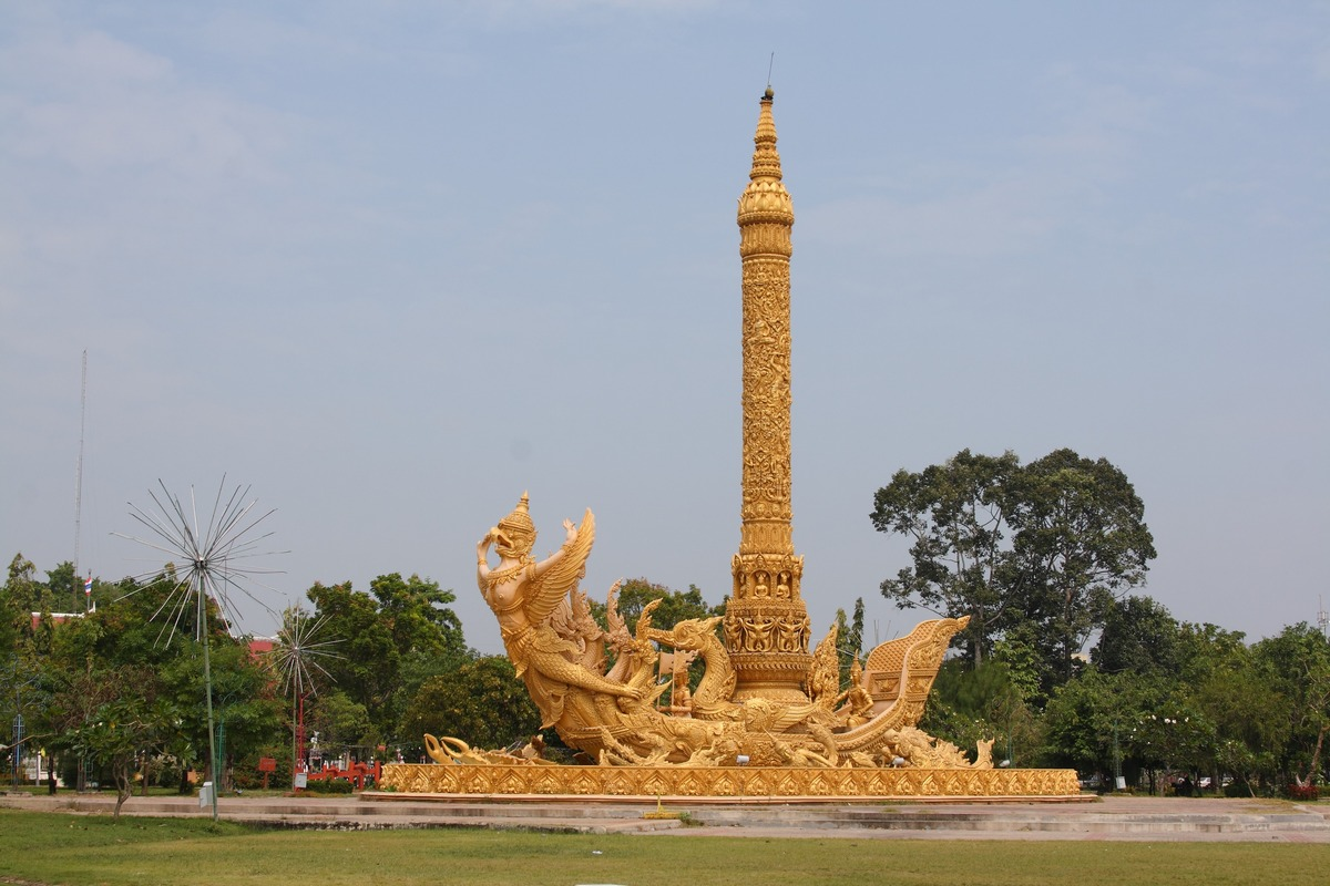 Ubon